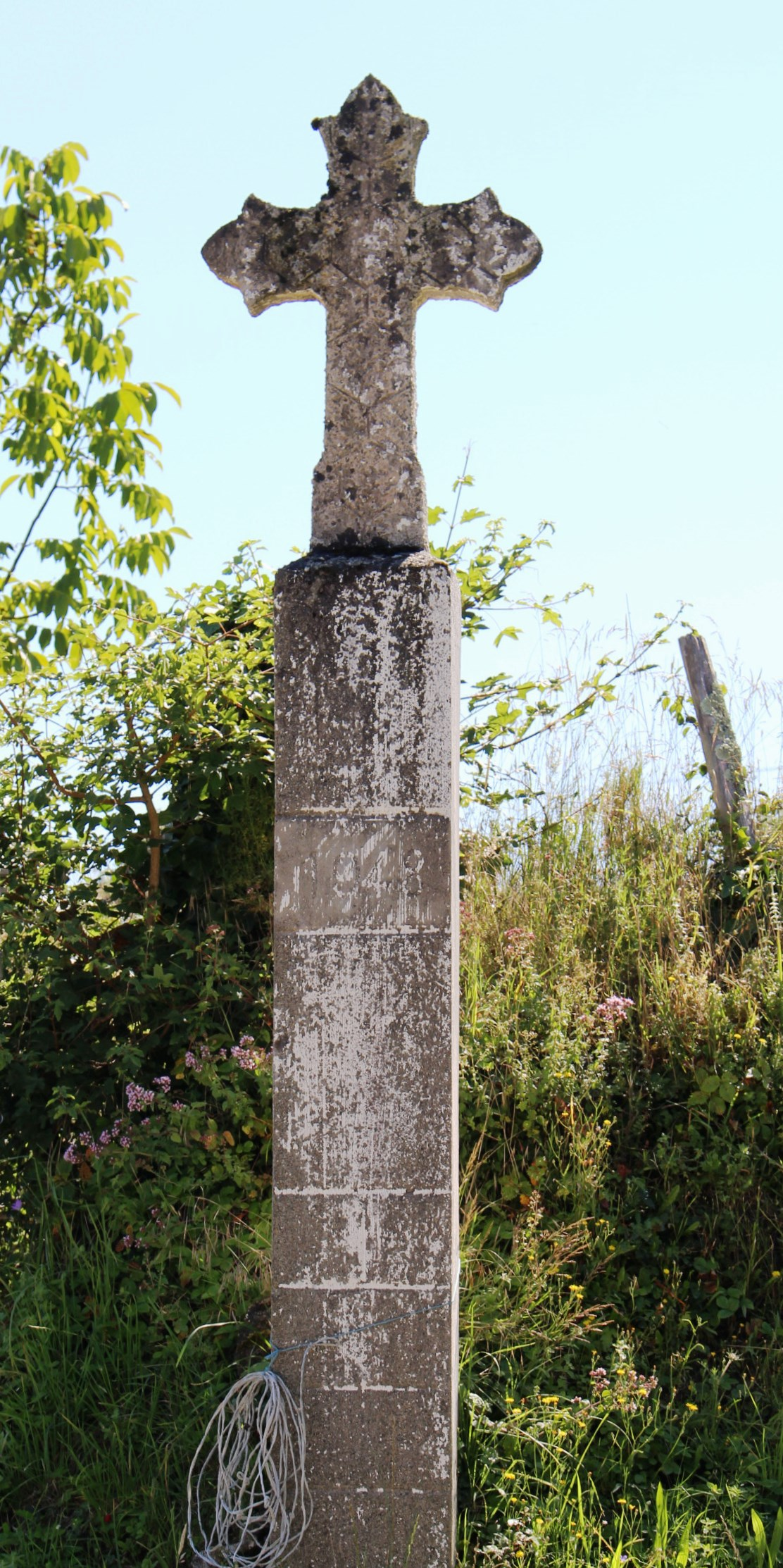 Croix de Sarlabous (Hautes-Pyrénées)